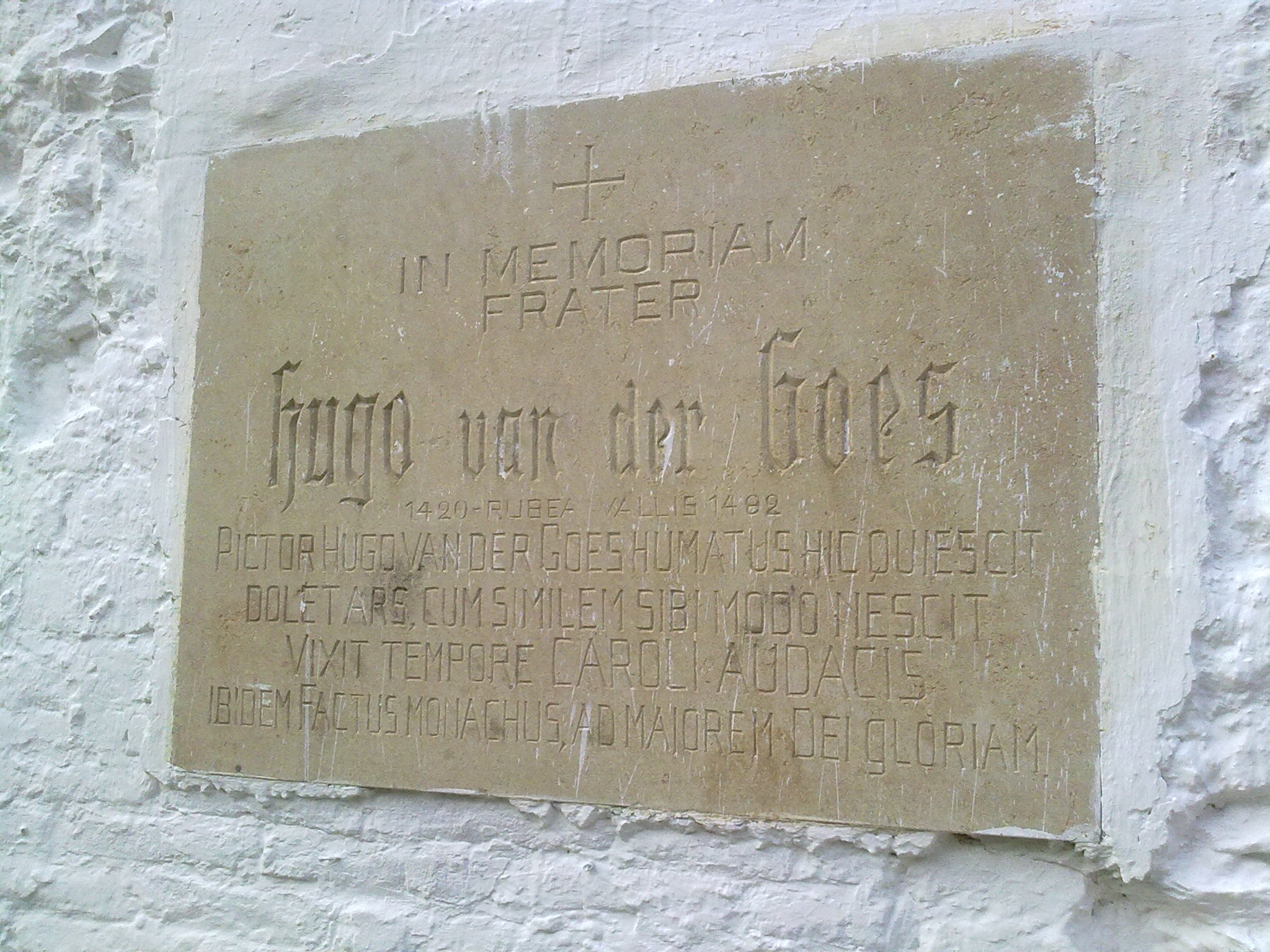 Plaque commémorative située au Prieuré du Rouge Cloître (Auderghem). Le texte est : "In Memoriam Frater Hugo Van der Goes 1420 Rubea - Vallis 1482 Pictor Hugo Van der Goes humatus hic quiescit dolet ars, cum similem sibi modo nescit vixit tempore CAROLI AUDACIS ibidem factus monachus, ad maiorem dei gloriam."